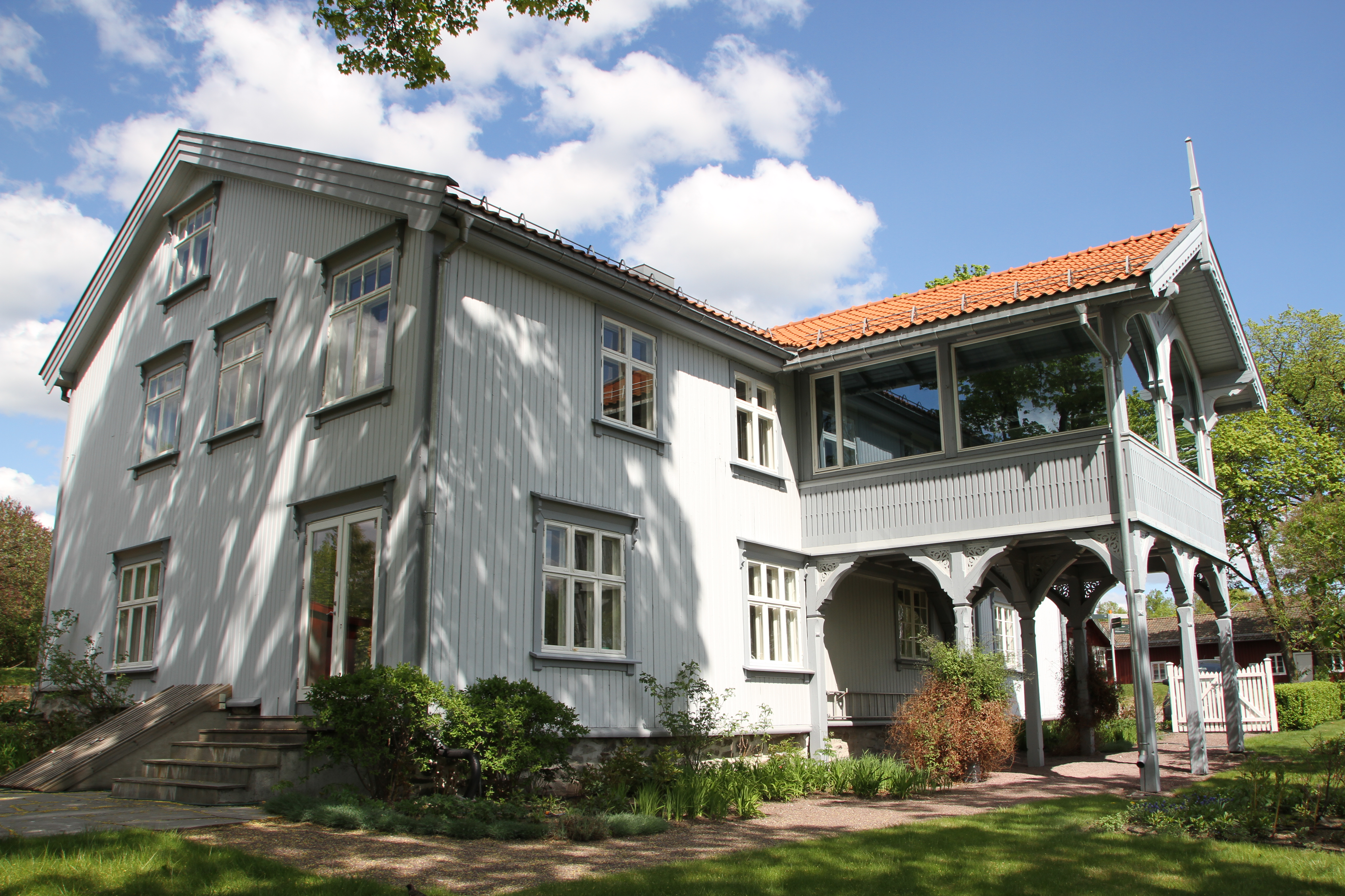 Fåbro Gård - a mansion at Lysaker/Ullern in Southwestern Oslo, along the Lysakerelva river. Oslo, Norway.